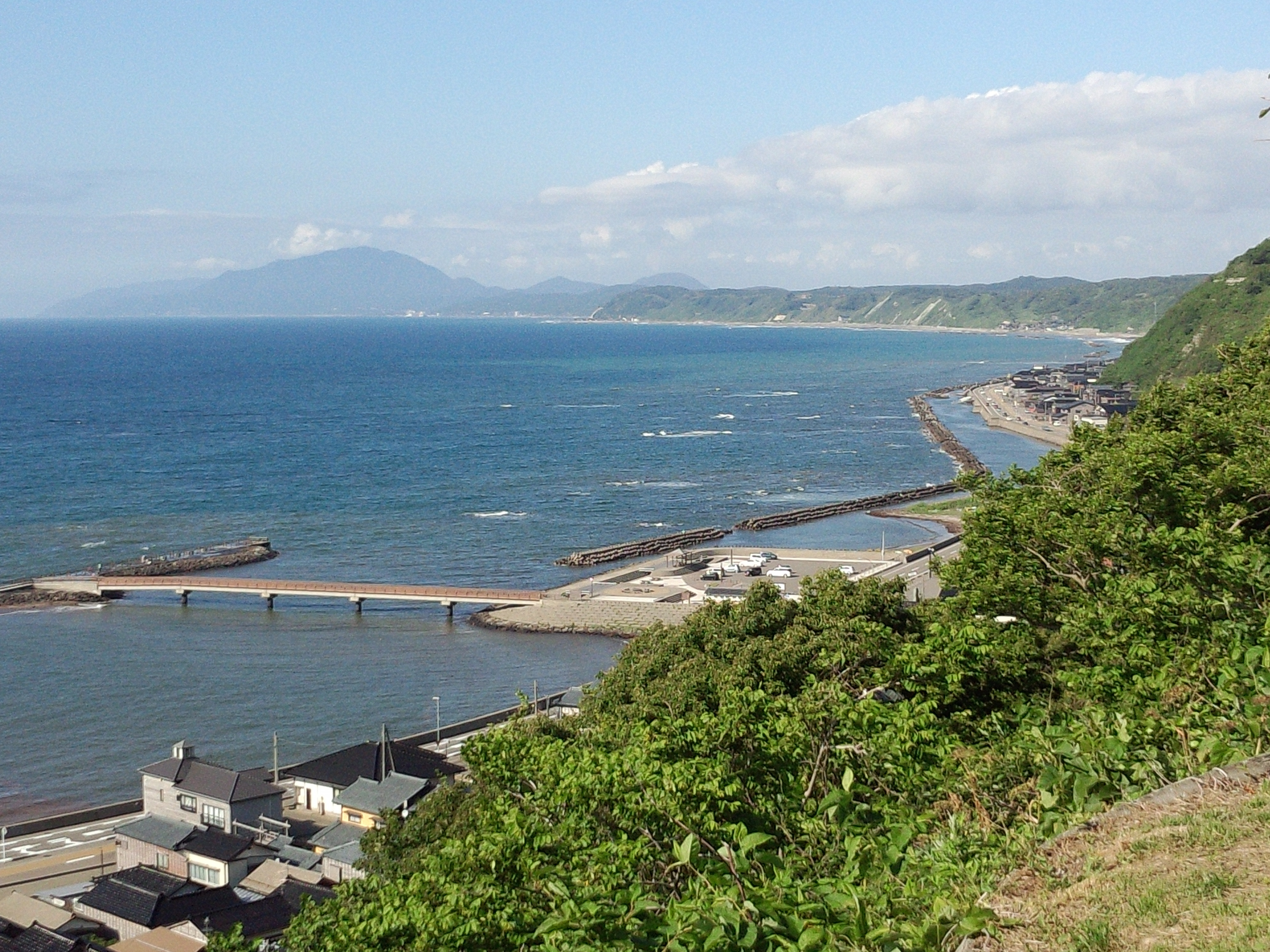 妻入りの街並みが海岸線沿いに4kmにわたって続く